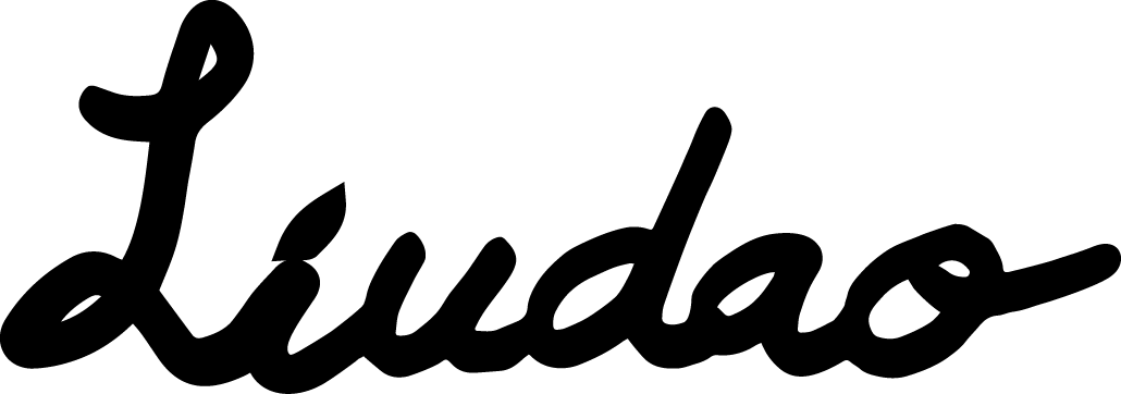 Firma Liu Dao 2016